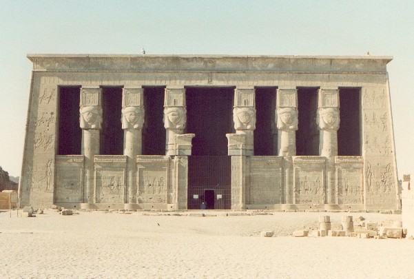 Dendera, Hathor temple